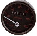 Compteur cyclo 103 SP/SPX